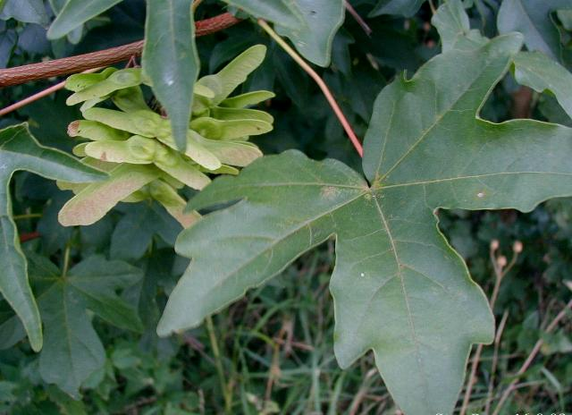 Denmark. Acer campestre